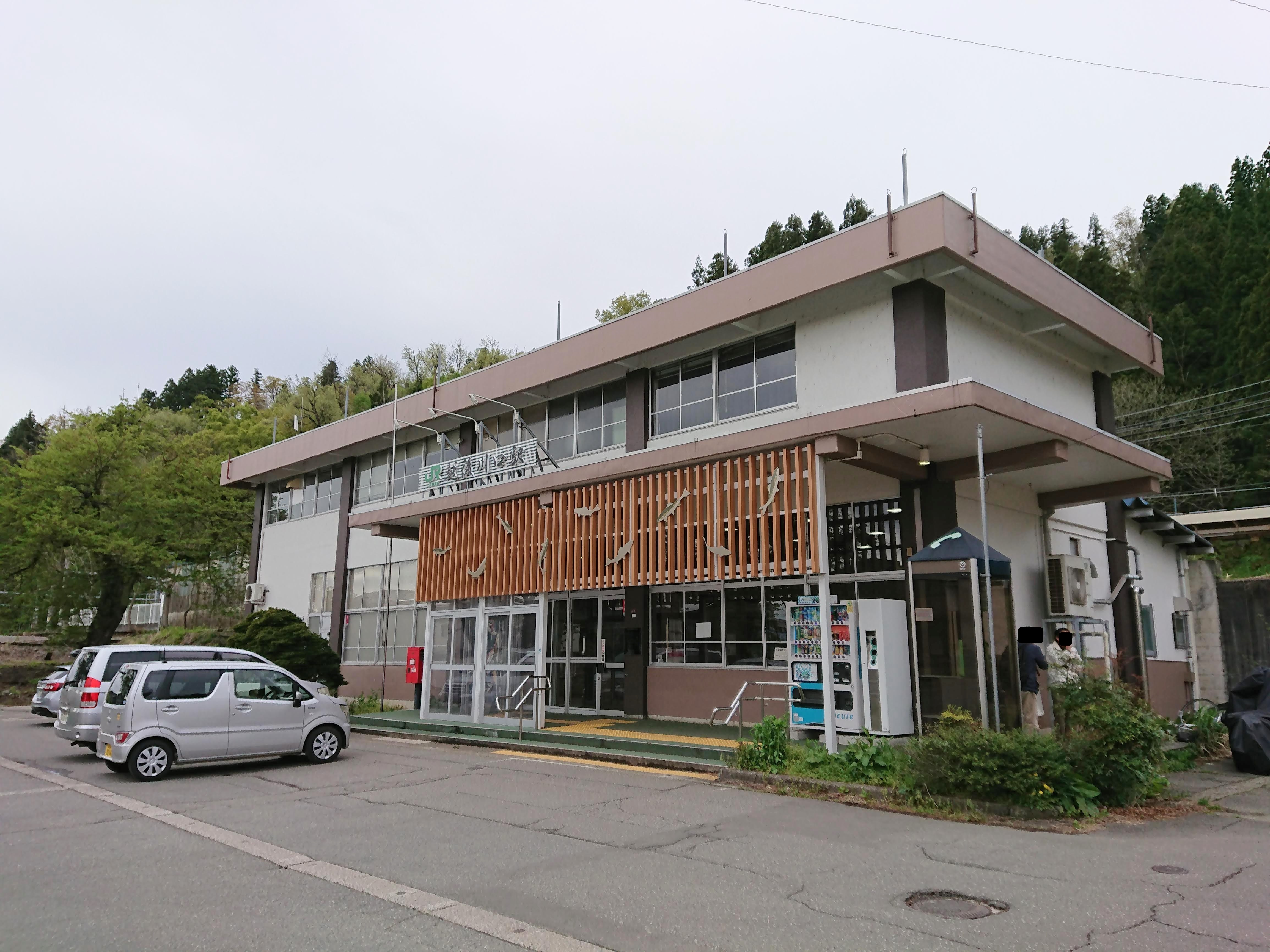 越後川口駅の駅舎外観（リニューアル後）